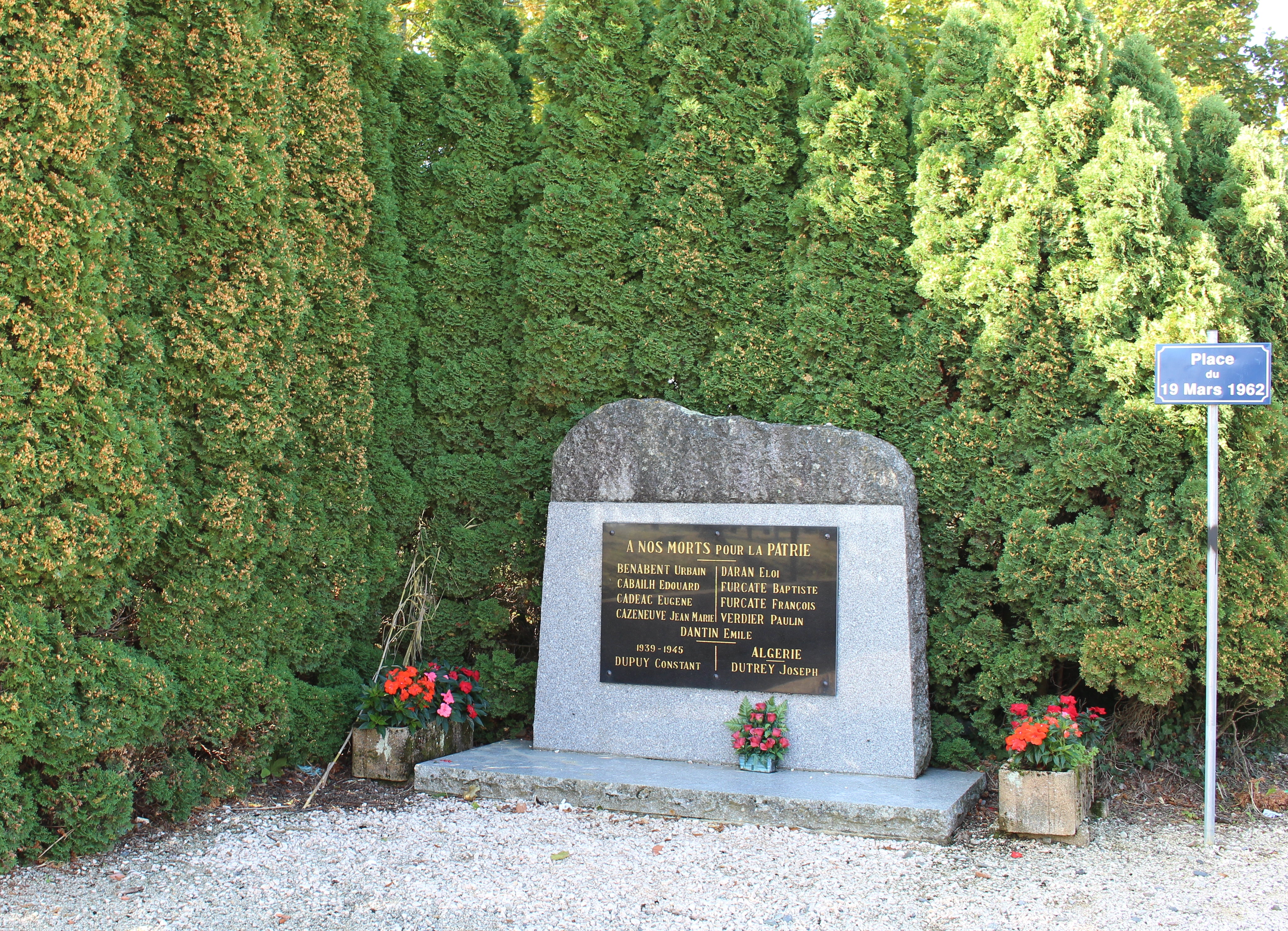 Monument aux morts de Thermes-Magnoac (Hautes-Pyrénées)